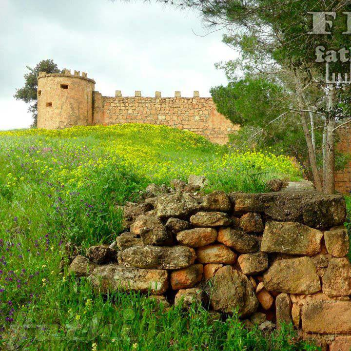 صورة من بلدية الساحل